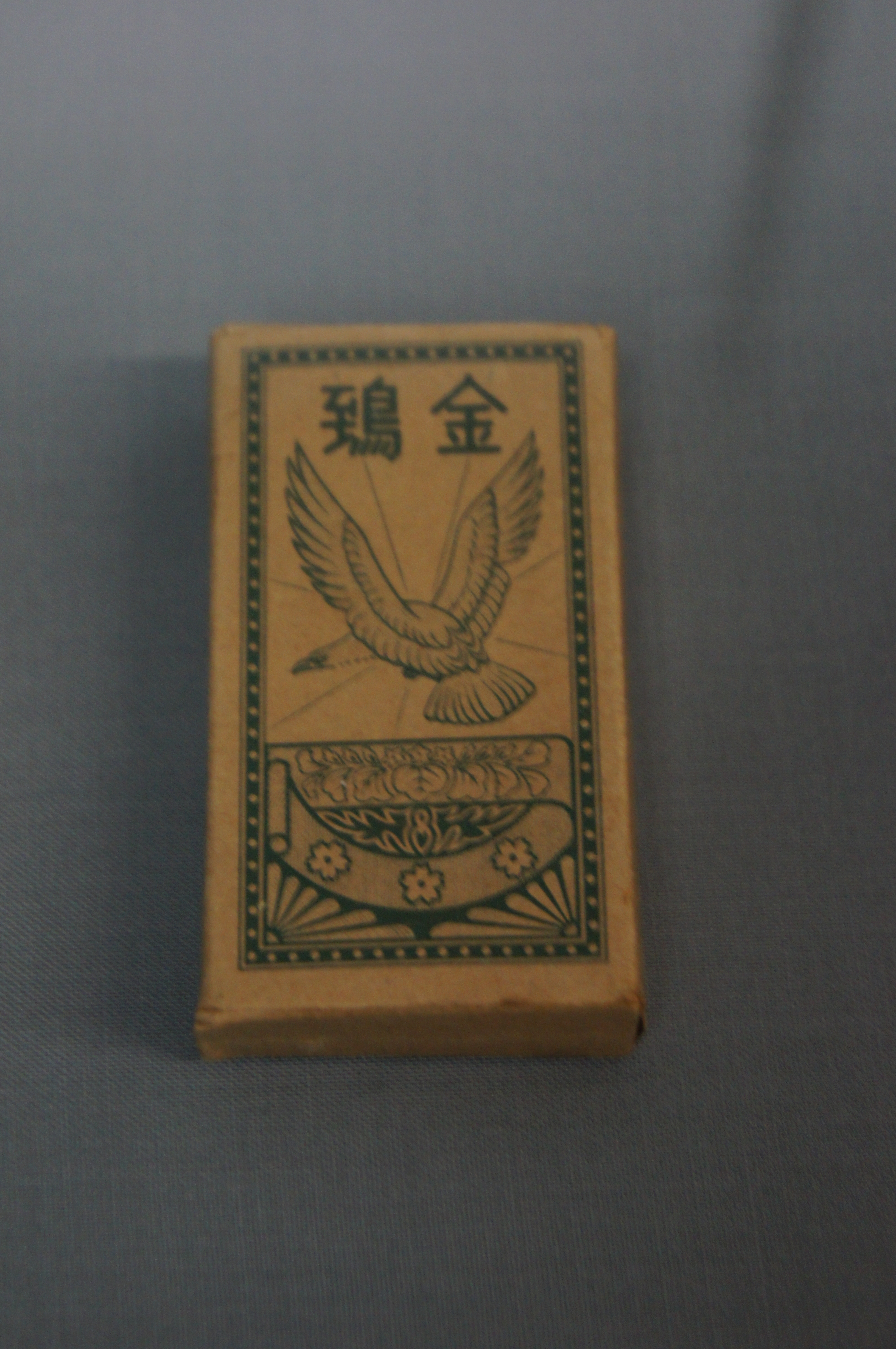 金鵄（戦時中ja:ゴールデンバットから改名されたタバコ）の箱。呉海事歴史科学館にて撮影。